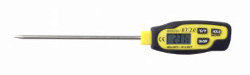 Digitales Einstechthermometer